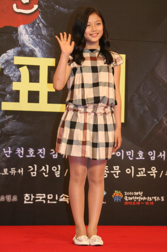 구미호 여우누이뎐 제작발표회